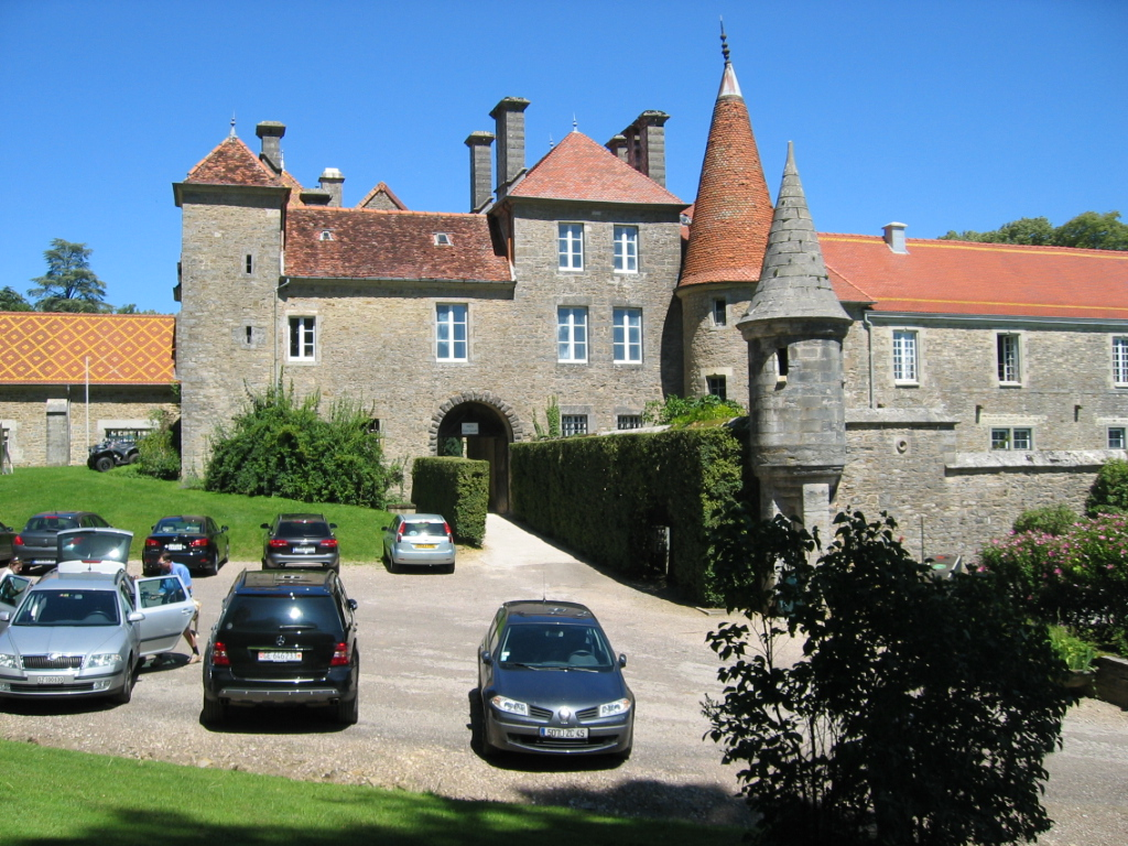 Chateau de Bournel - Franche Comté - France